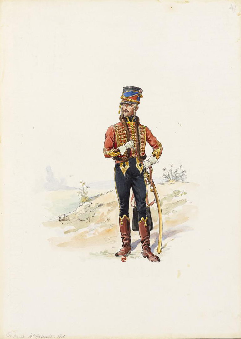 Lieutenant du 4e Hussards en 1806.